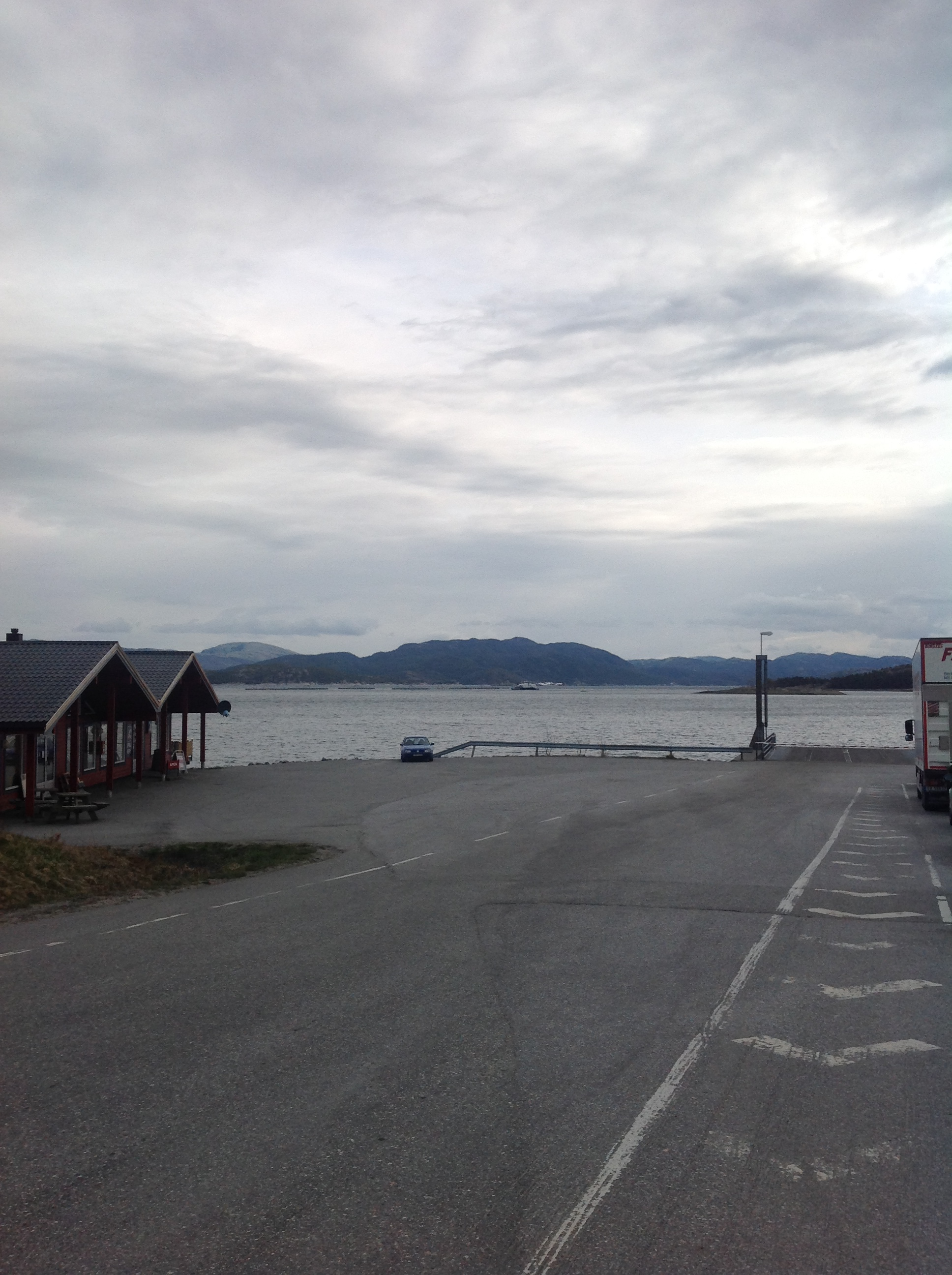 Lund ferjeleie på fylkesvei 769 i Nærøy; sørsiden av ferjesambandet Lund-Hofles